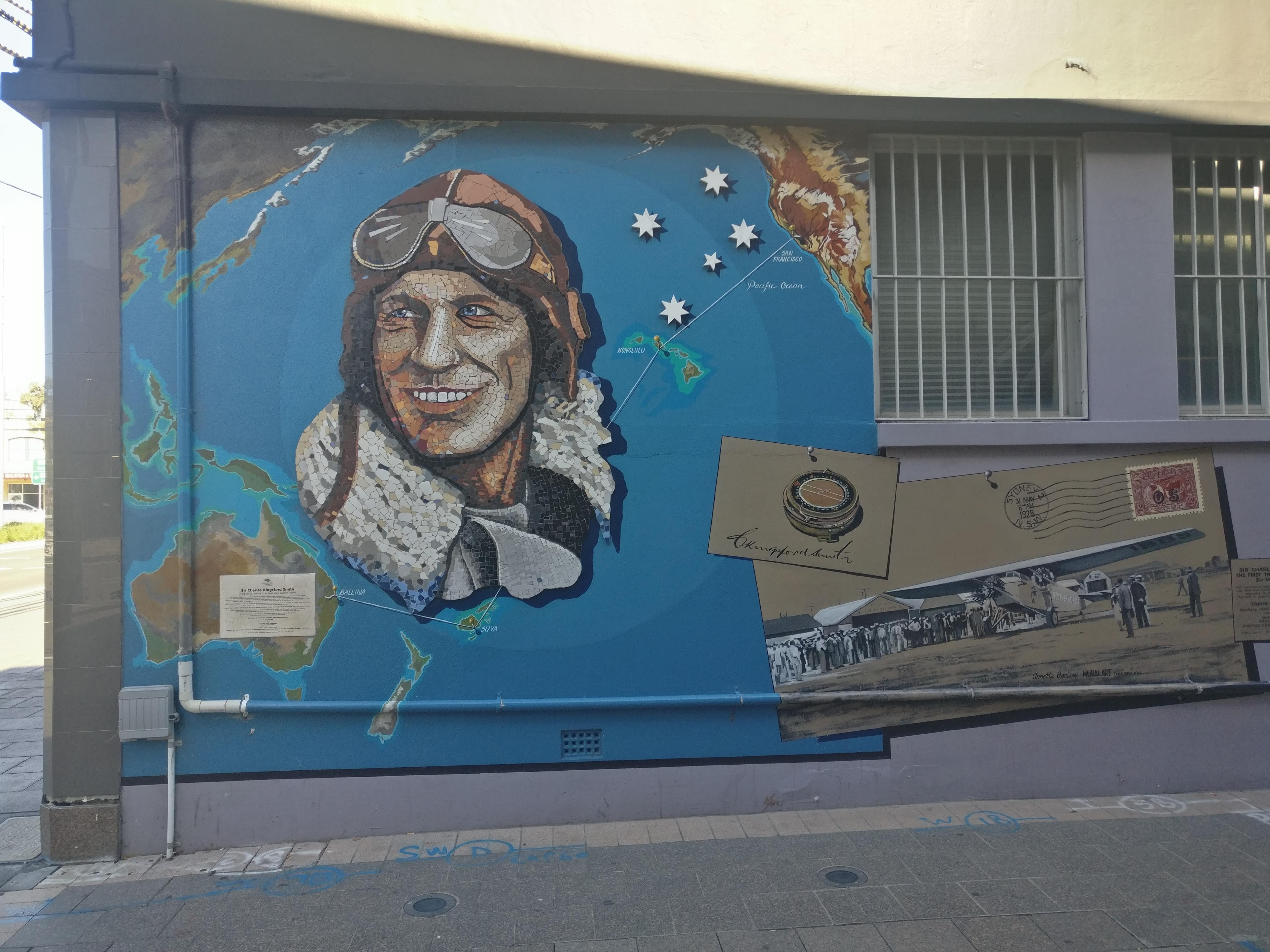 金斯福德·史密斯主题的马赛克艺术画